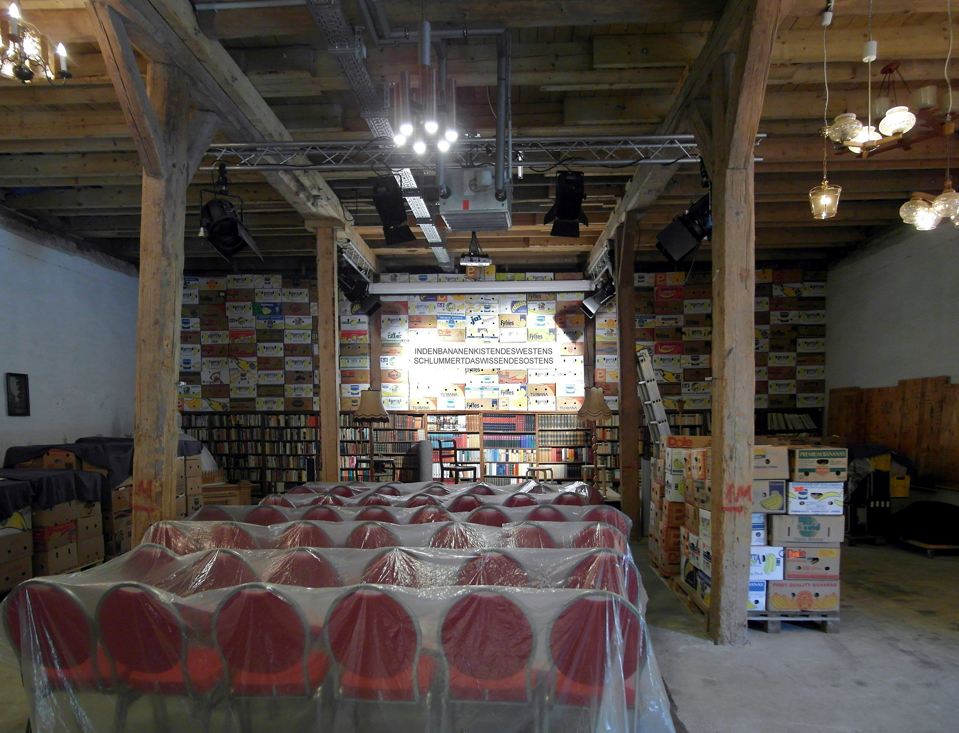 12.05.2017 01594 Staucha (Stauchitz), Thomas-Müntzer-Platz 8: Das Hoftheater in der Scheune der Peter-Sodann-Bibliothek: INDENBANANENKISTENDESWESTENS SCHLUMMERTDASWISSENDESOSTENS. Nach dem Ausbau des Kuhstalls wurde 2012 die "Peter-Sodann-Bibliothek" eröffnet. Hier findet man eine Sammlung aller nach 1945 in der SBZ und DDR erschienen Bücher. [SAM9778.JPG]20170512385DR.JPG(c)Blobelt